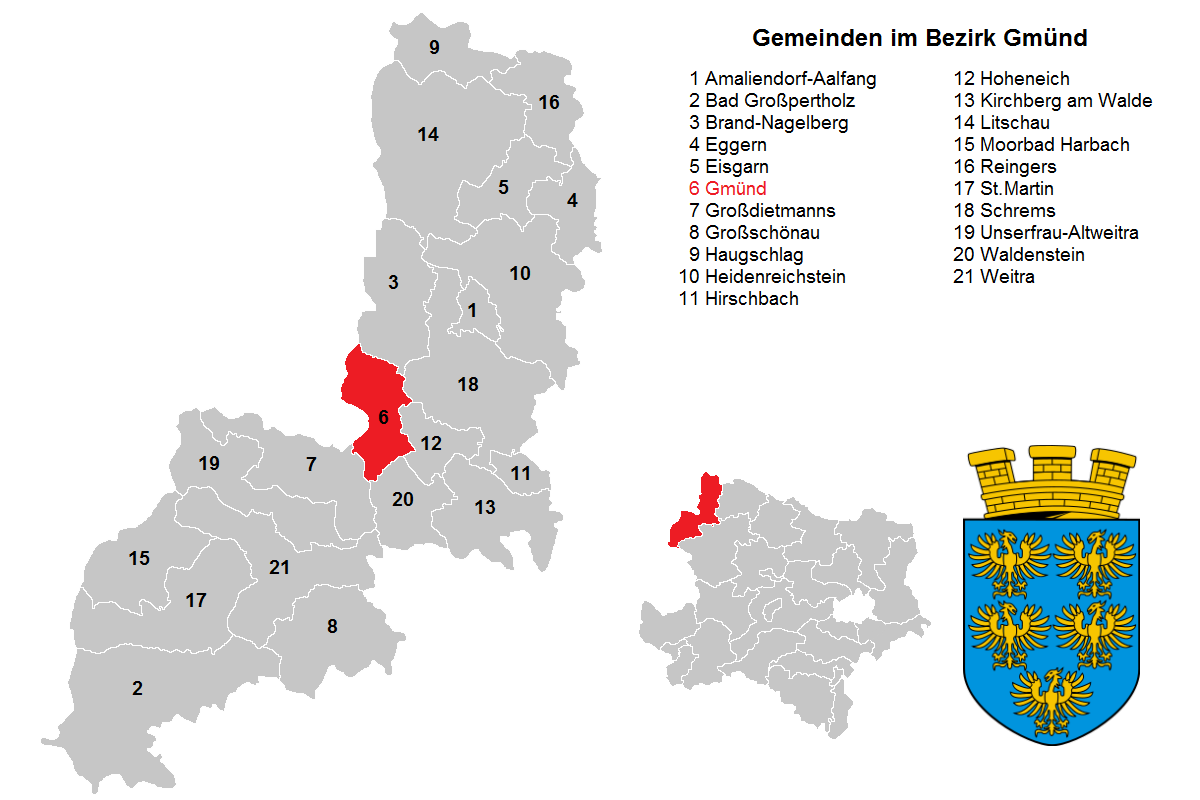 Bezirk Baden